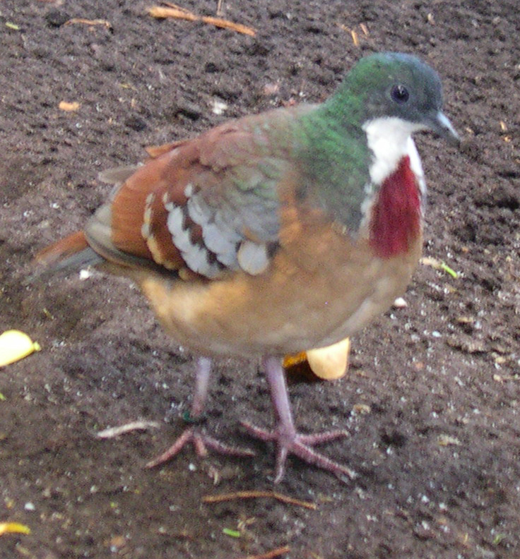 Een Barletts dolksteekduif (Gallicolumba criniger) in de Filipijnenhal van Avifauna. Foto genomen door Magalhães op 8 november 2005